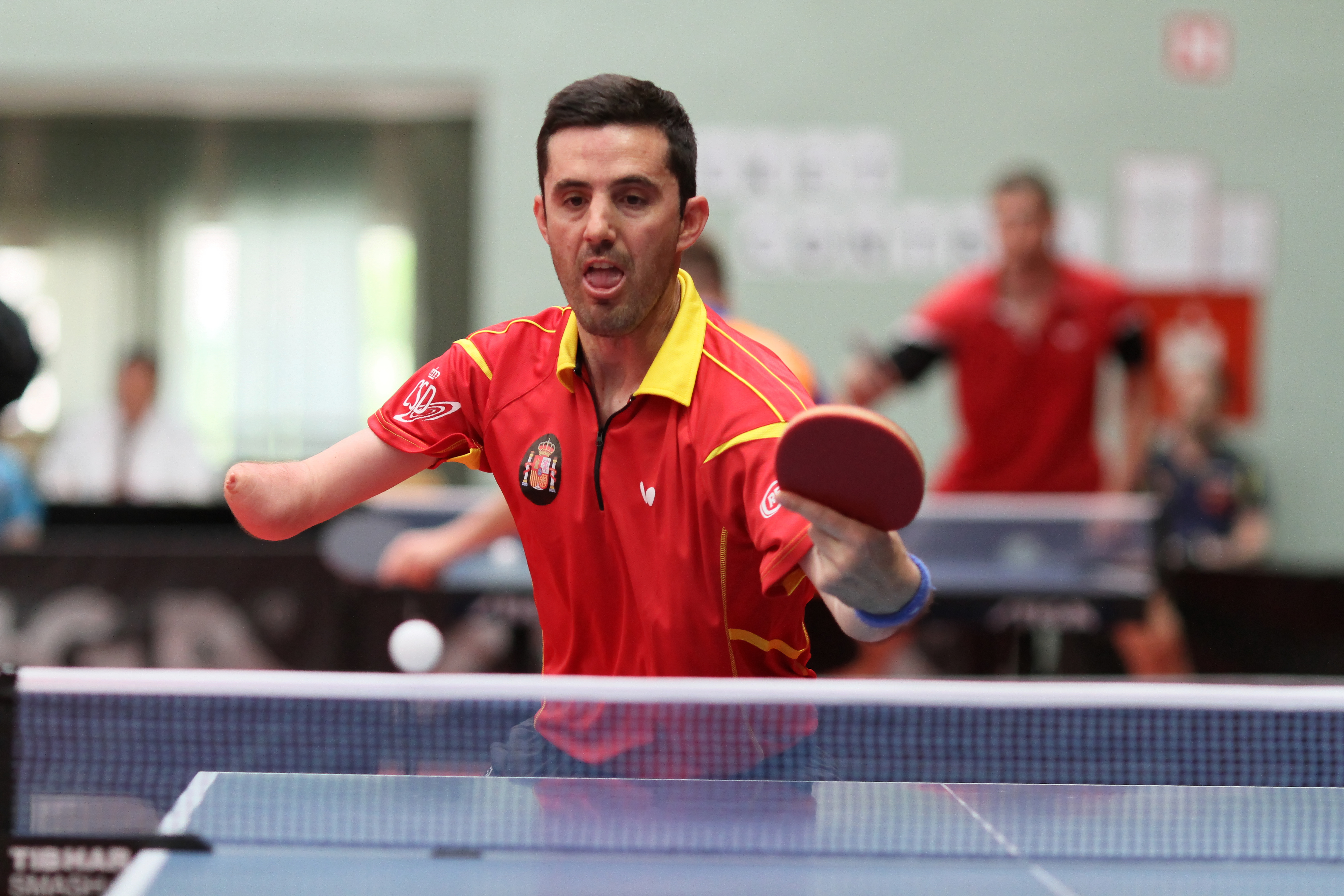 RUIZ REYES Jose Manuel (ESP) IMG_7601_DxO